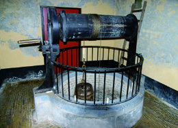 Echoput Apeldoorn